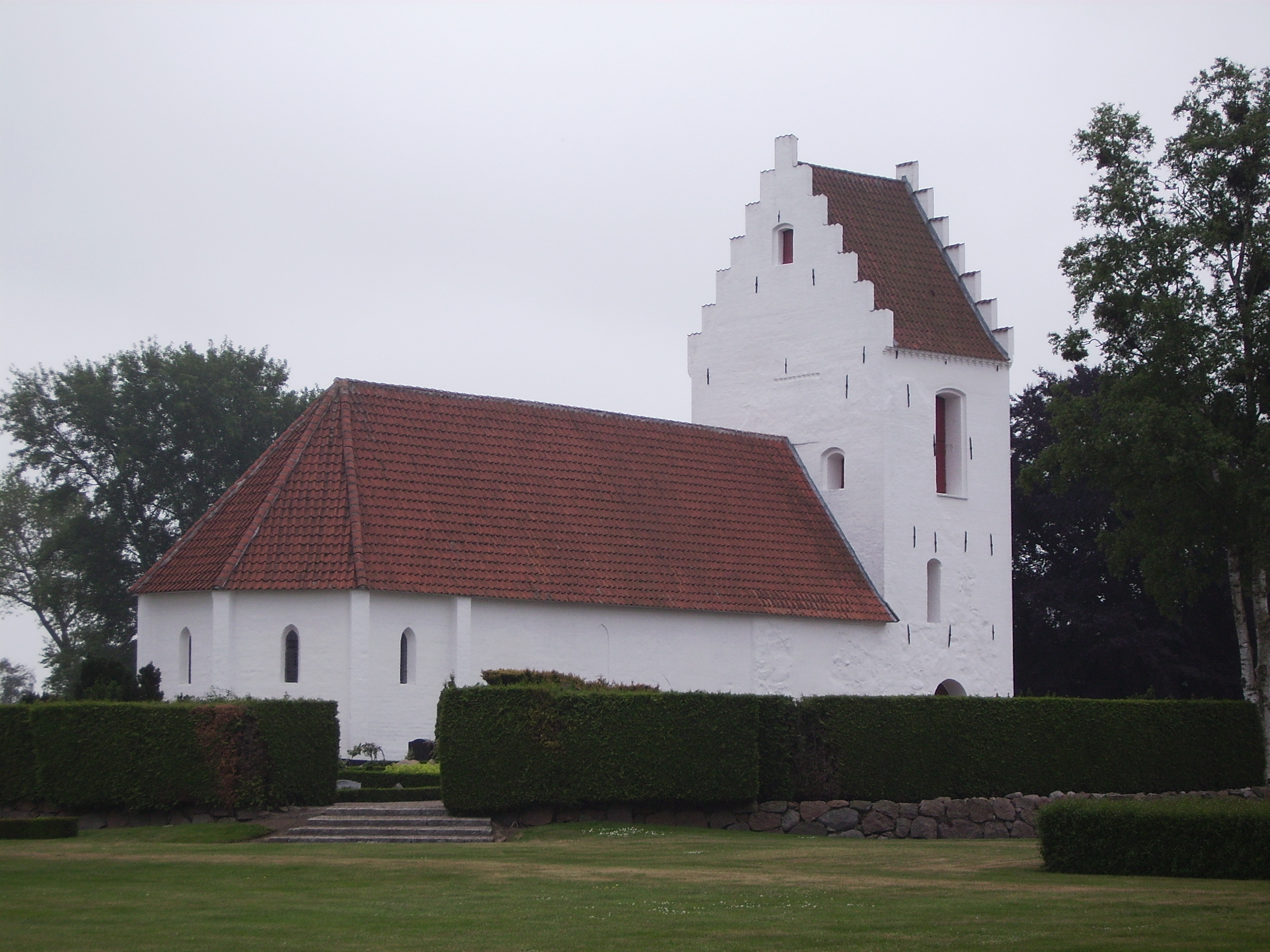 Vejle Kike, Vejle Sogn, Sallinge Herred, Svendborg Amt, Denmark (Danish Church)